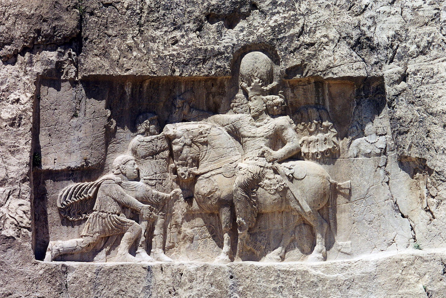 Naqsh-i Rustam (Iran). Bas-relief rupestre représentant le triomphe du roi Shapour Ier sur les empereurs romains Philippe l'Arabe (244-249), à genoux faisant sa soumission, et Valérien (253-260) debout, fait prisonnier. Les mains de Valérien sont dissimulées à l'intérieur des manches en signe de servitude. Derrière Shapour, un personnage imberbe coiffé d'une tiare est peut-être le môbedh Kartir, chef religieux. Années 260. Photo Ginolerhino 2002.